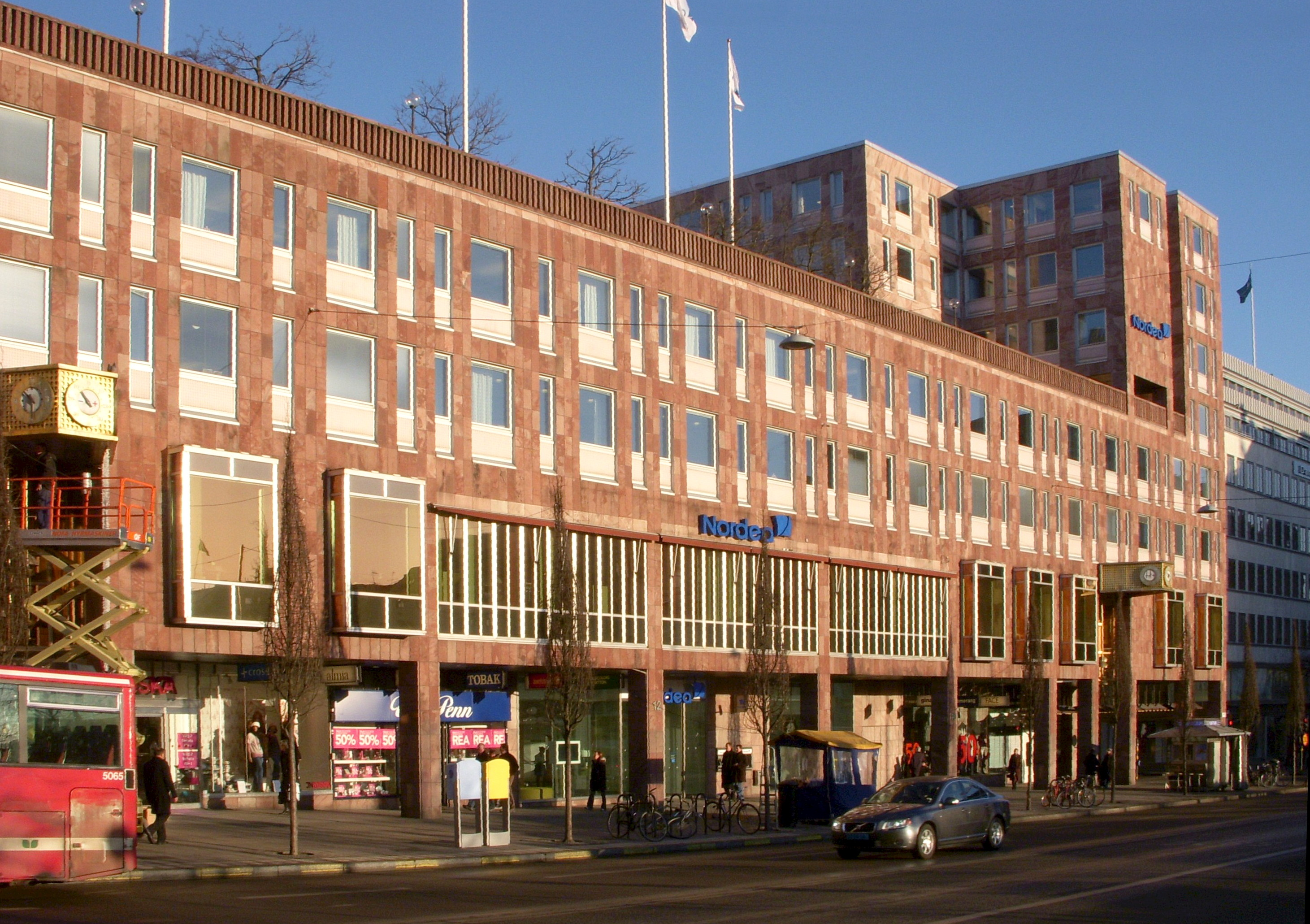 PK-huset, Hamngatan i Stockholm